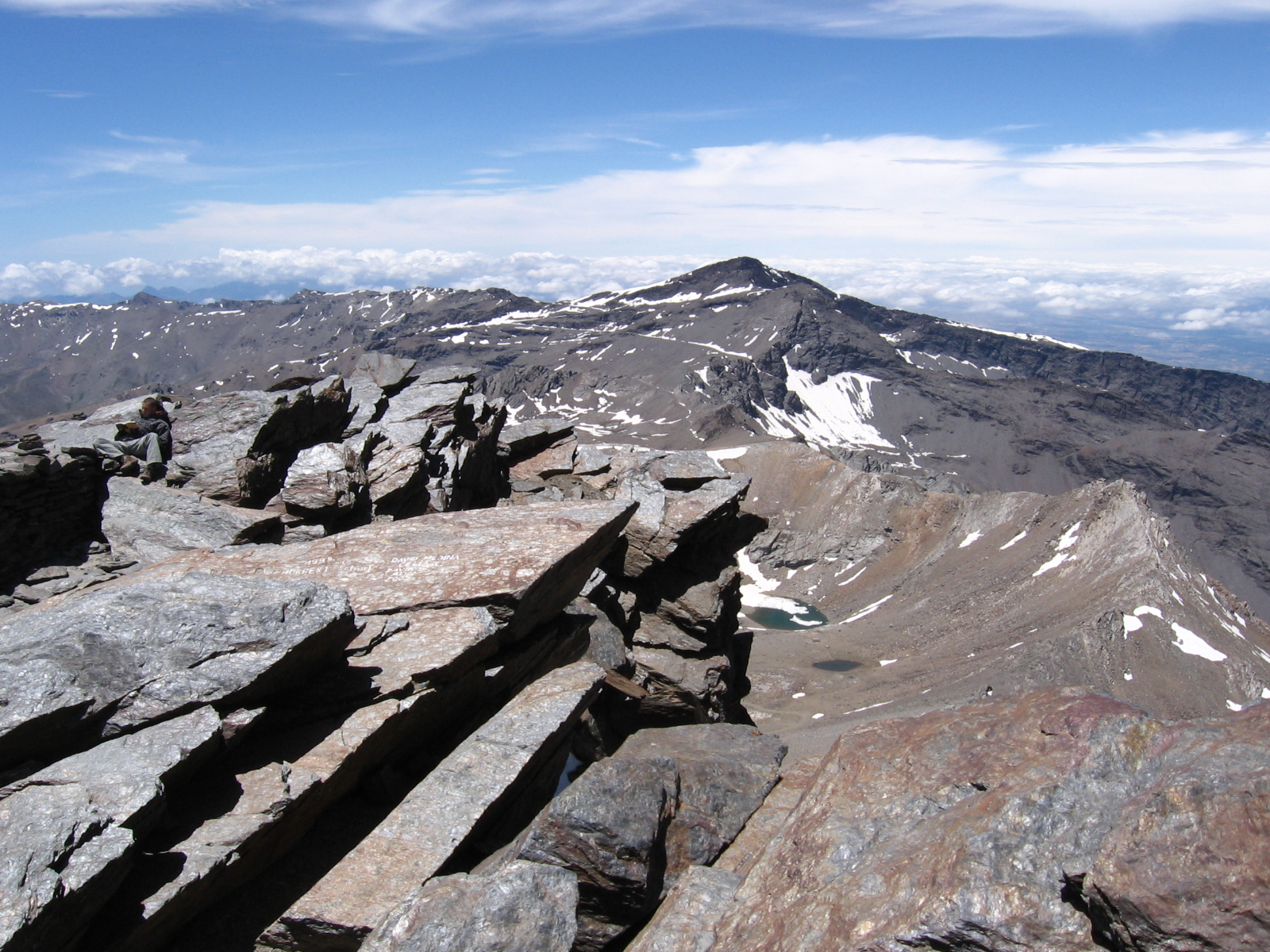 Vista del pico Veleta desde la cima del Mulhacén. Debajo del Veleta se observa la Laguna de la Caldera.